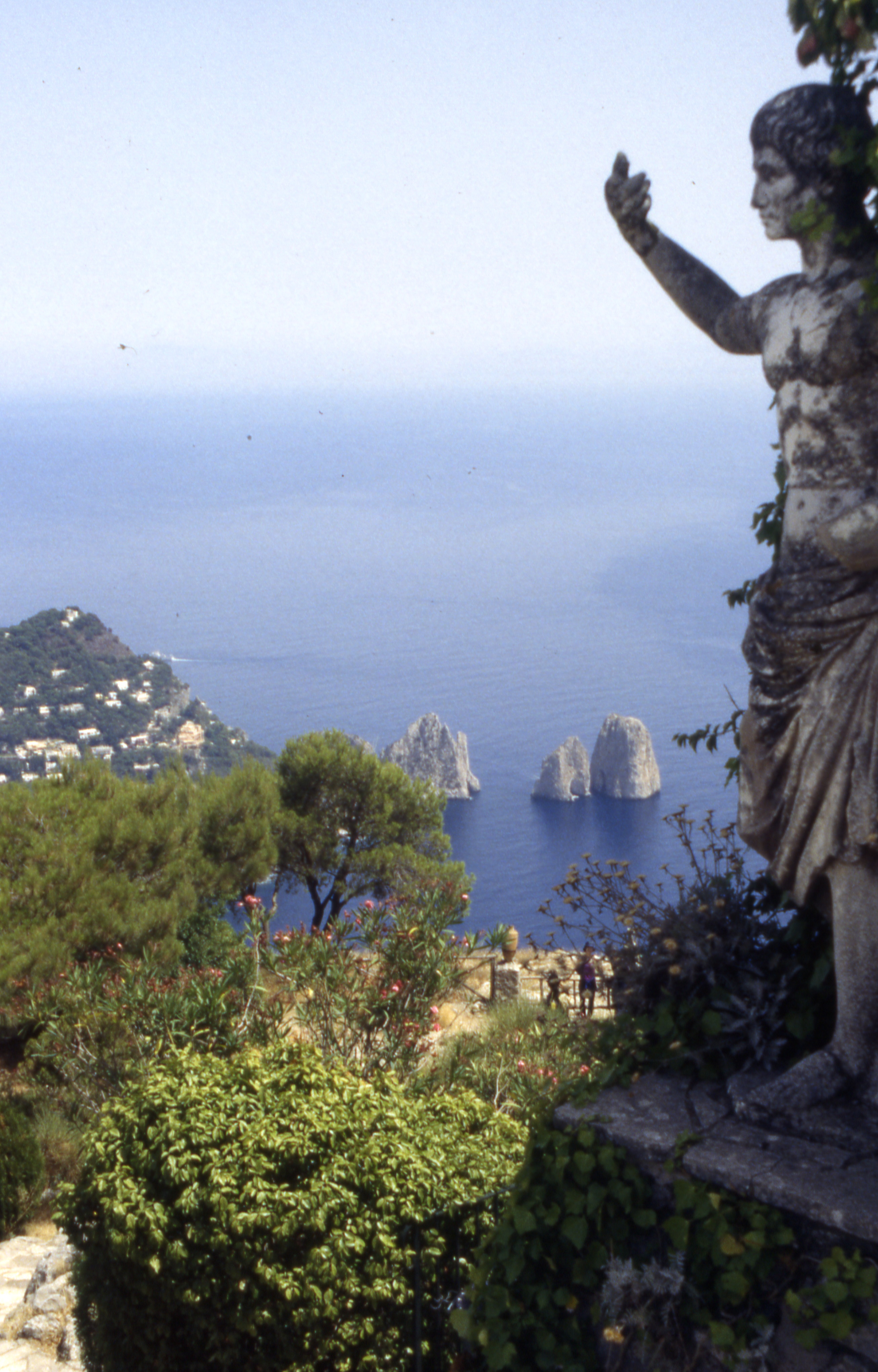 Capri Ansicht